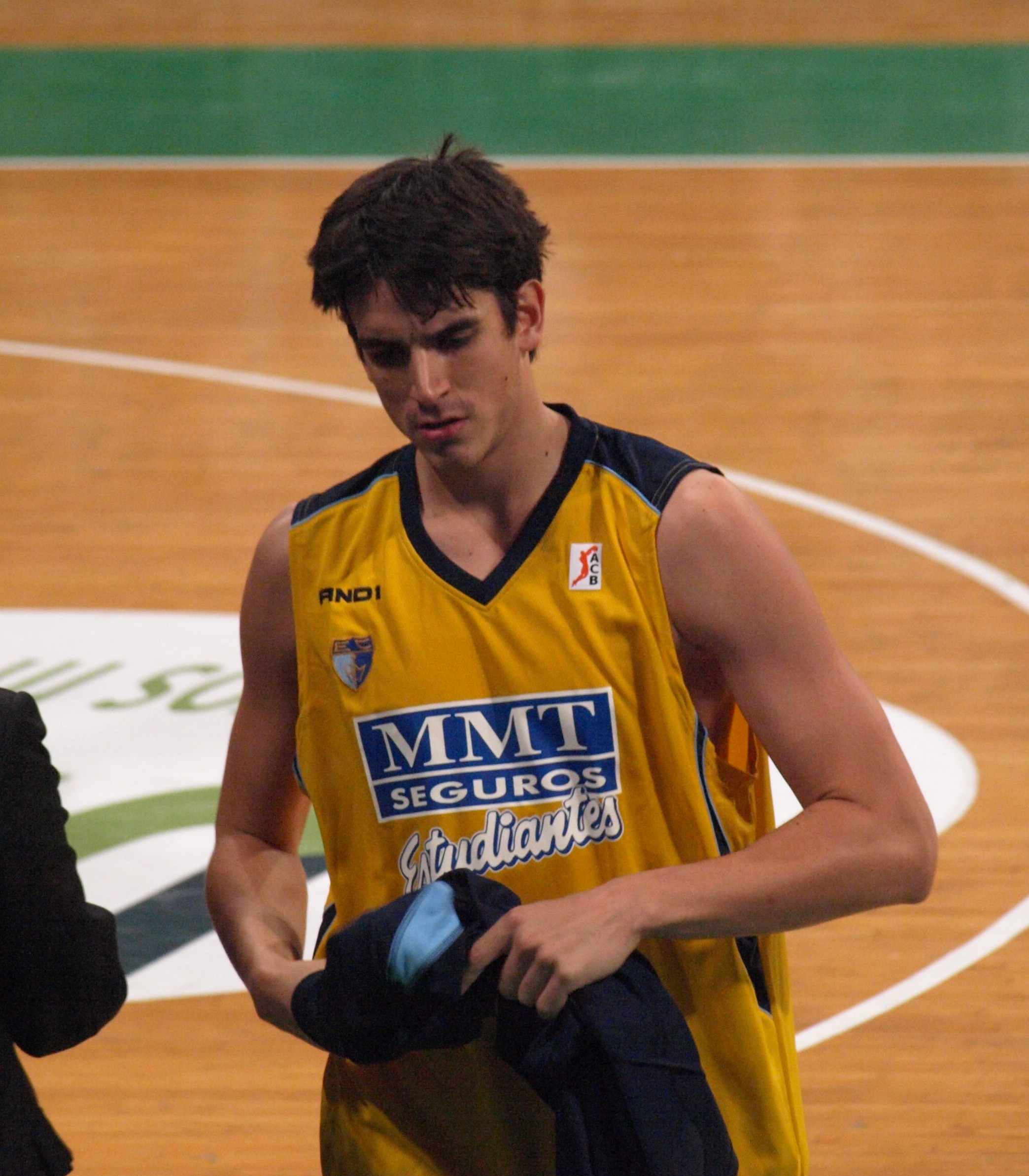 Carlos Suarez durante la disputa del partido de la segunda jornada de la liga ACB 2008-09 que enfrentó al Estudiantes y al DKV Joventut en el Olímpico de Badalona.